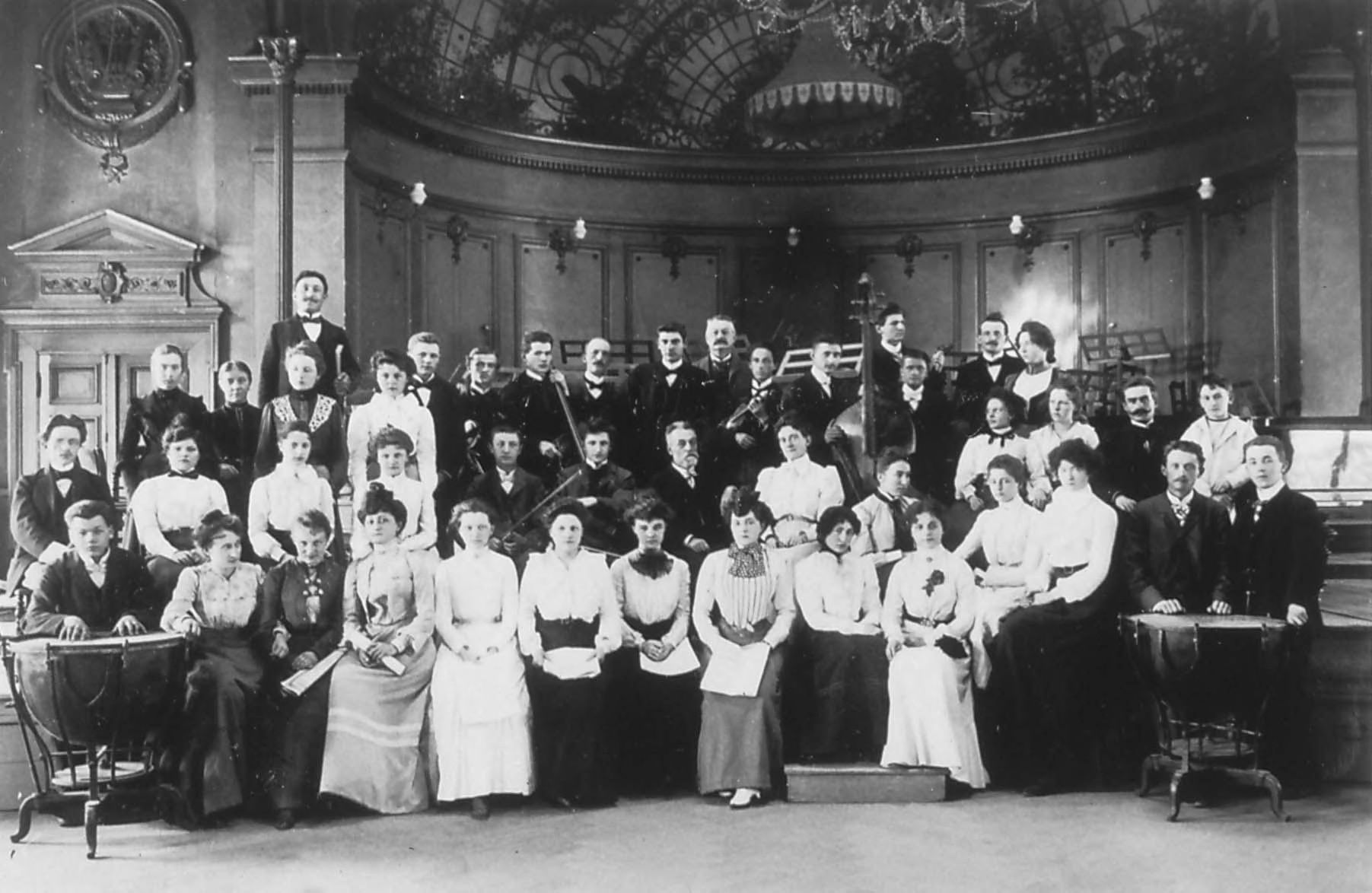 Franz Stockhausen, entouré d'un groupe de professeurs et d'élèves du Conservatoire de Strasbourg (salle de l'Aubette). Bibliothèque nationale et universitaire de Strasbourg